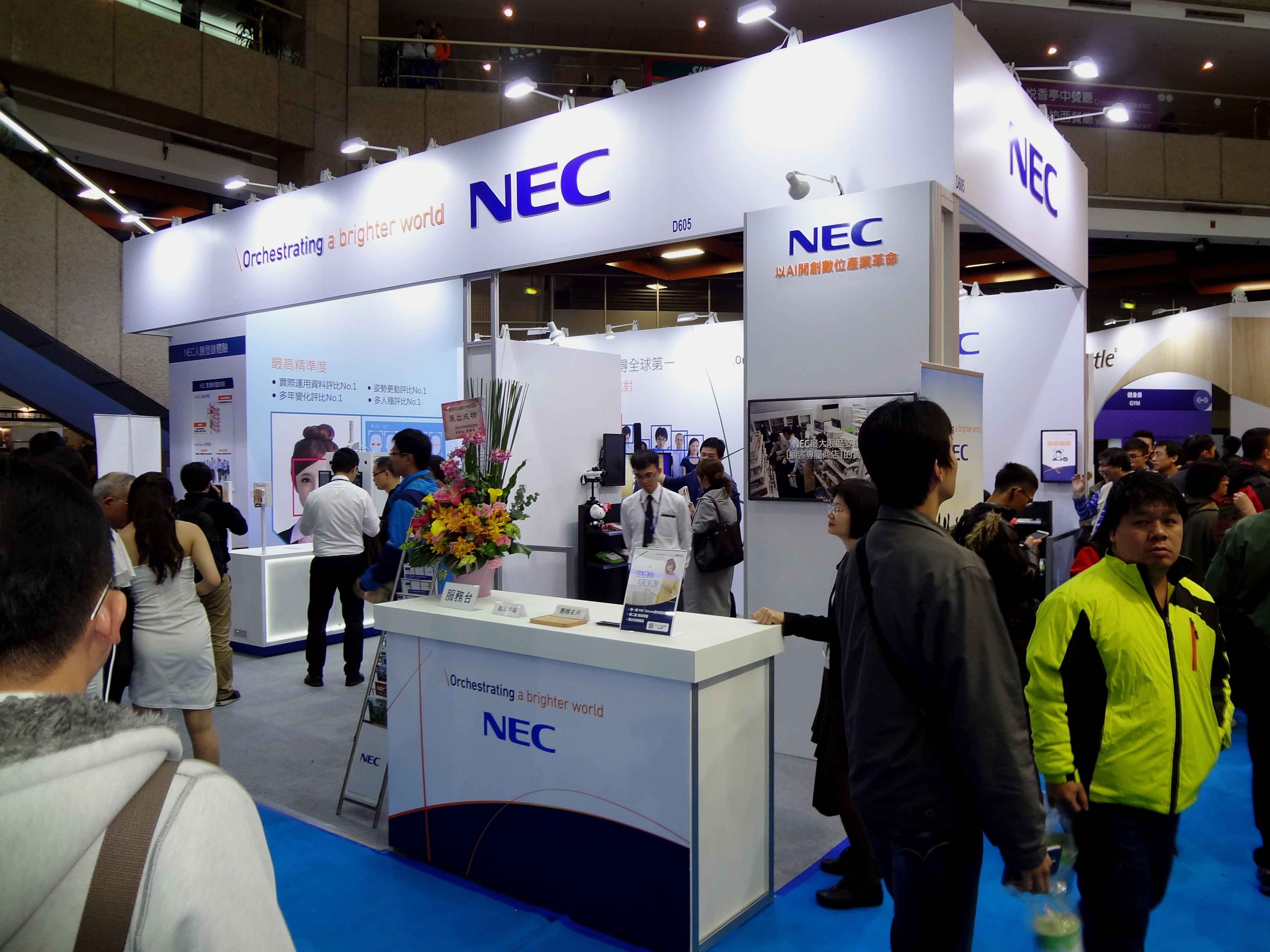 中文（台灣）: 2017年台北資訊月，台灣恩益禧攤位。